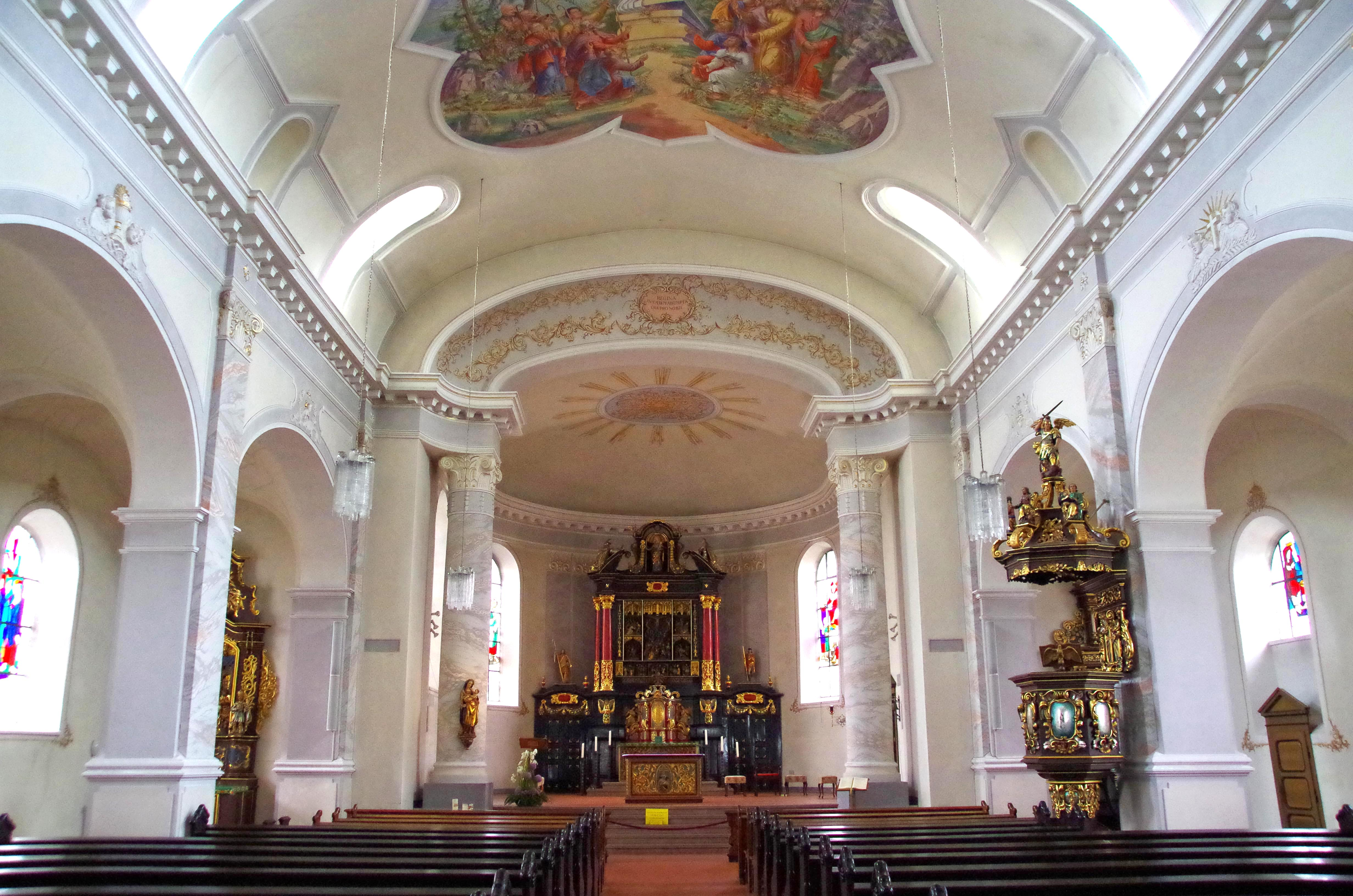 Sankt-Mariä-Himmelfahrt (Bleialf), neues Kirchenschiff mit Kanzel und Hochaltar aus dem 17. Jahrhundert